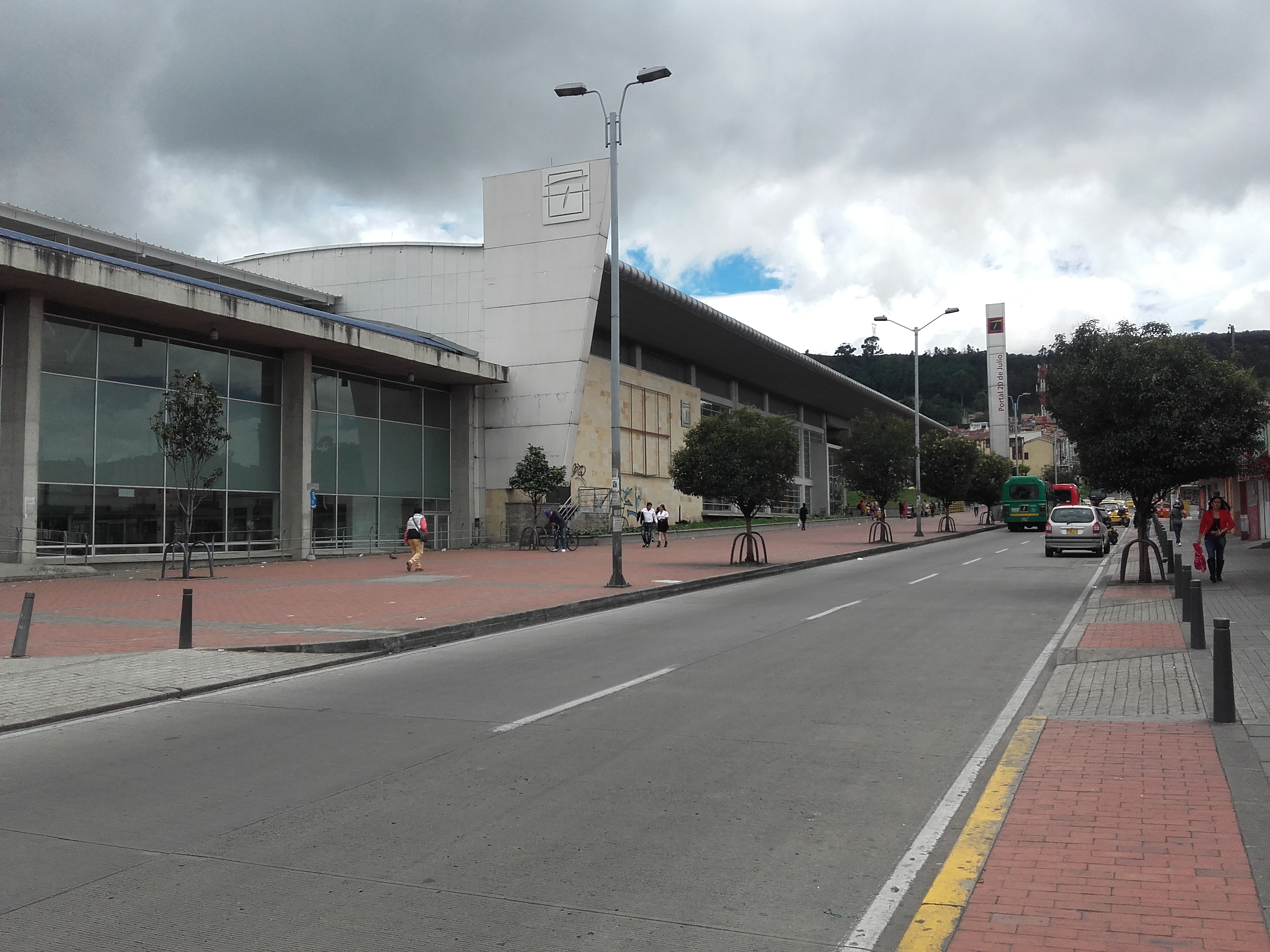 fnfnnfnfnfnfnfnfnfnfnfnf